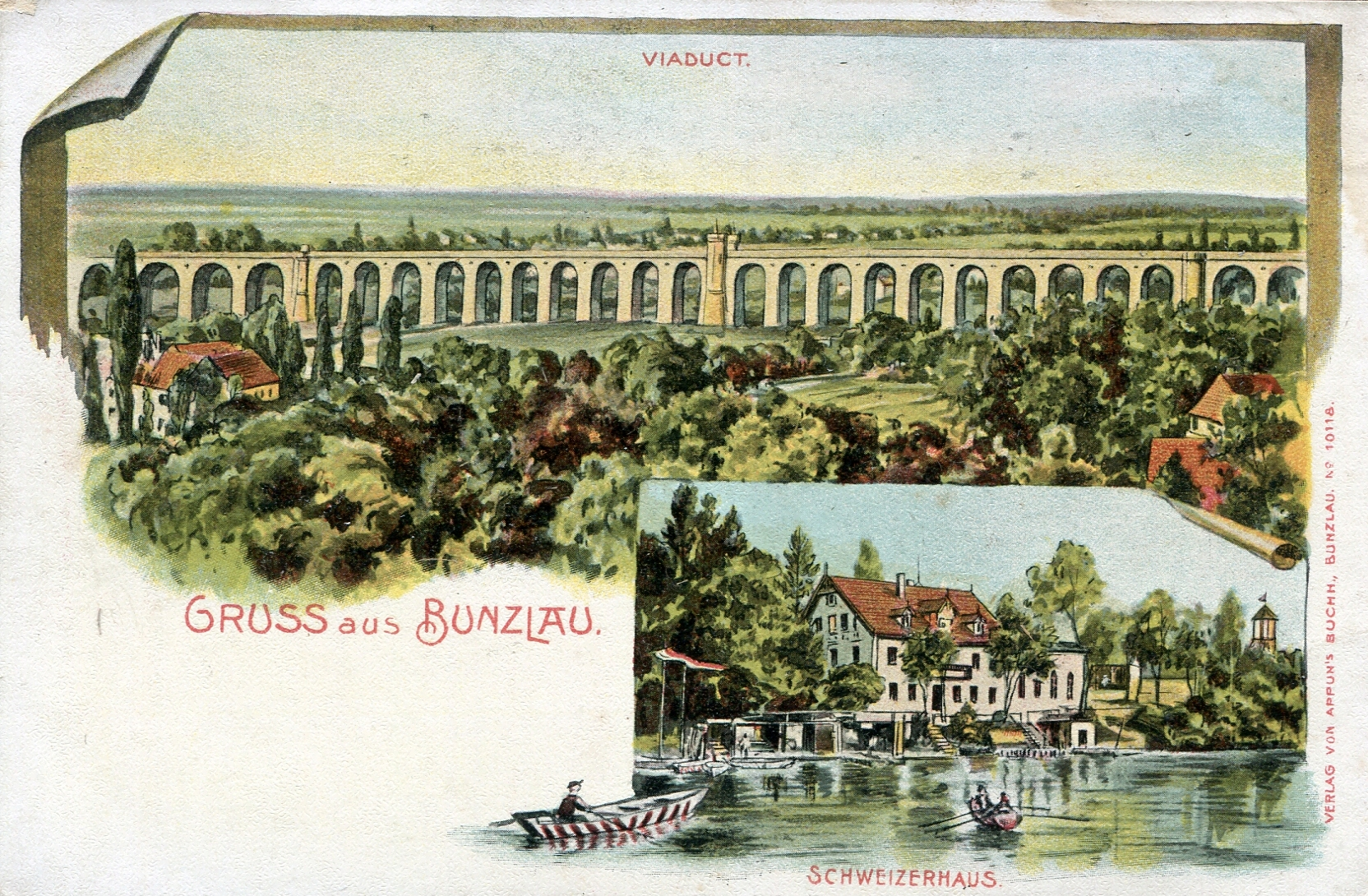 Titel: Gruss aus BUNZLAU, VIADUCT, SCHWEIZERHAUS; Kartennummer: 10118; Signatur: ohne ; Gedruckt bei: Appun's Buchh. Bunzlau